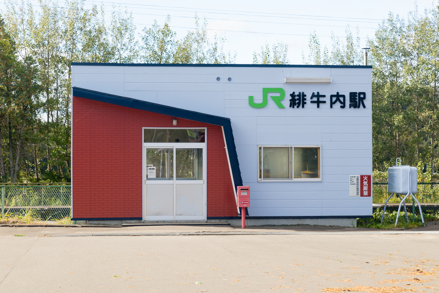 北海道旅客鉄道株式会社石北本線緋牛内駅駅舎